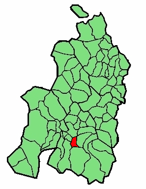 aipaturiko udalerriaren kokapena Nafarroa Beherean